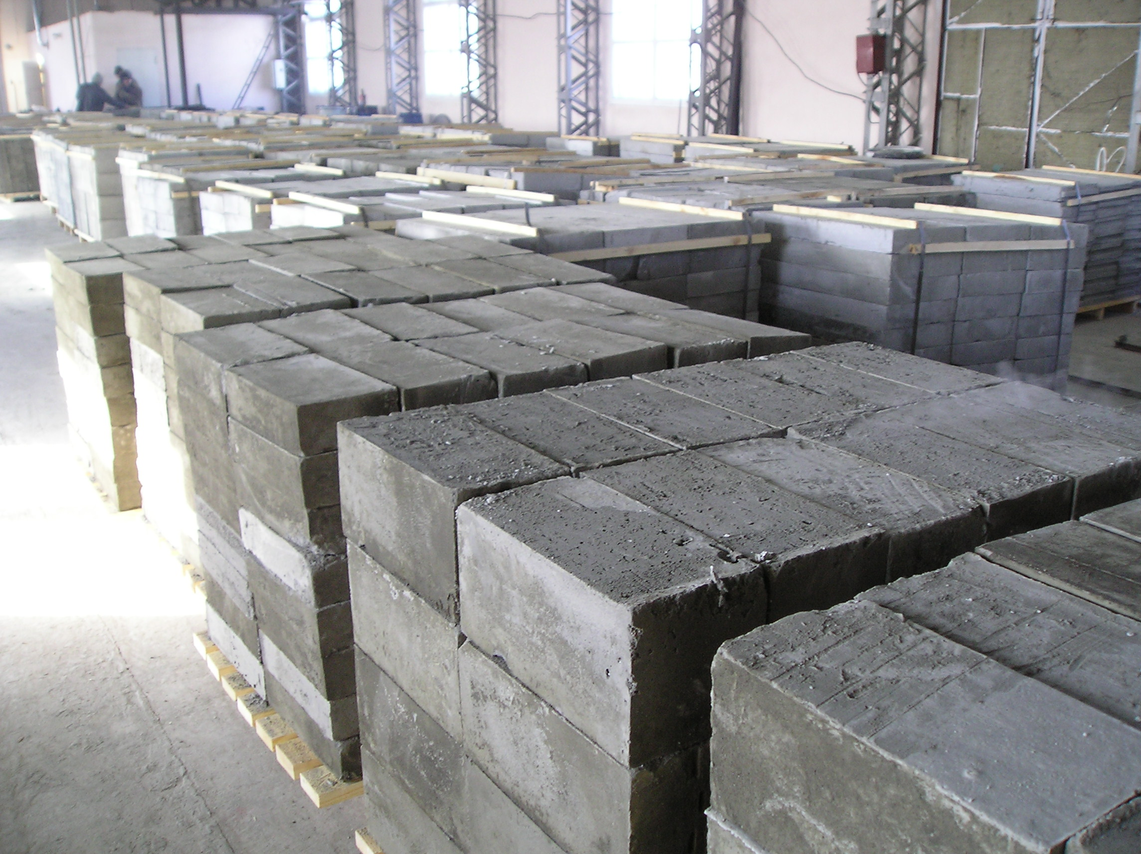 Склад готовых газопеноблоков г. Новосибирск